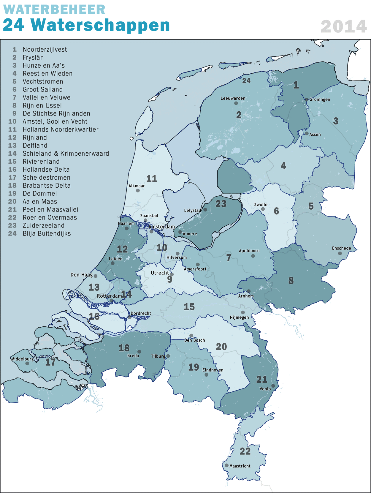 Overzichtskaart van de Nederlandse Waterschappen, per 1-1-2014